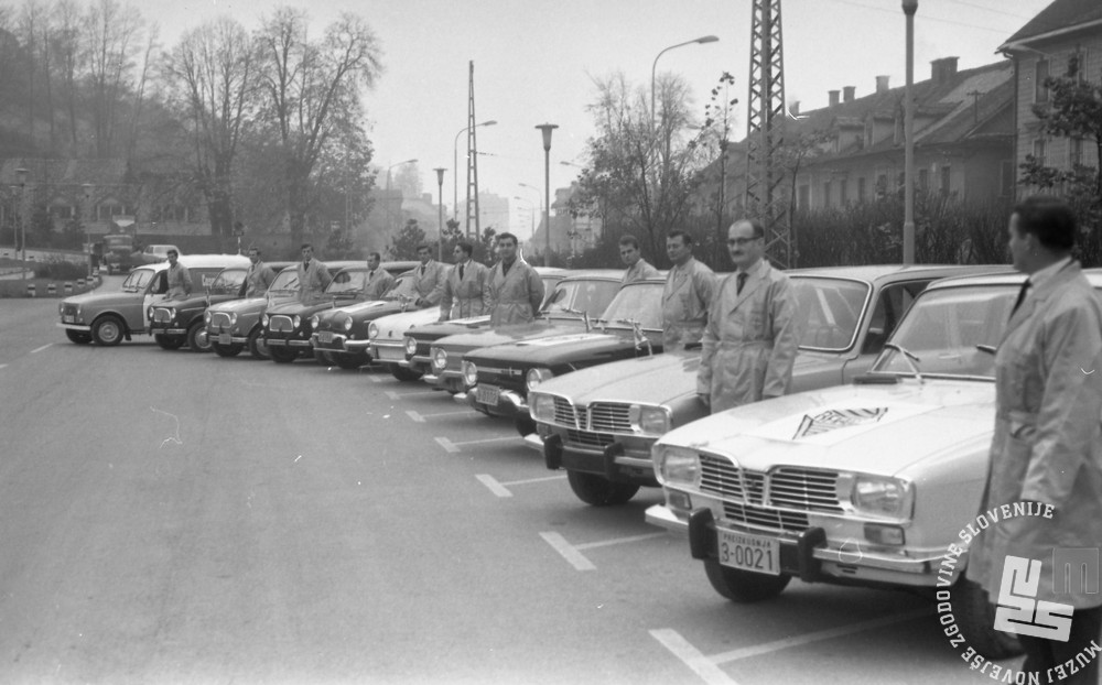 Ljubljančani so si lahko novembra 1966 na parkirišču pred parkom Tivoli ogledali najnovejše Renaultove avtomobile, ki so jih nato poslali v Beograd na razstavo uvoznika teh vozil, družbe Cosmos.